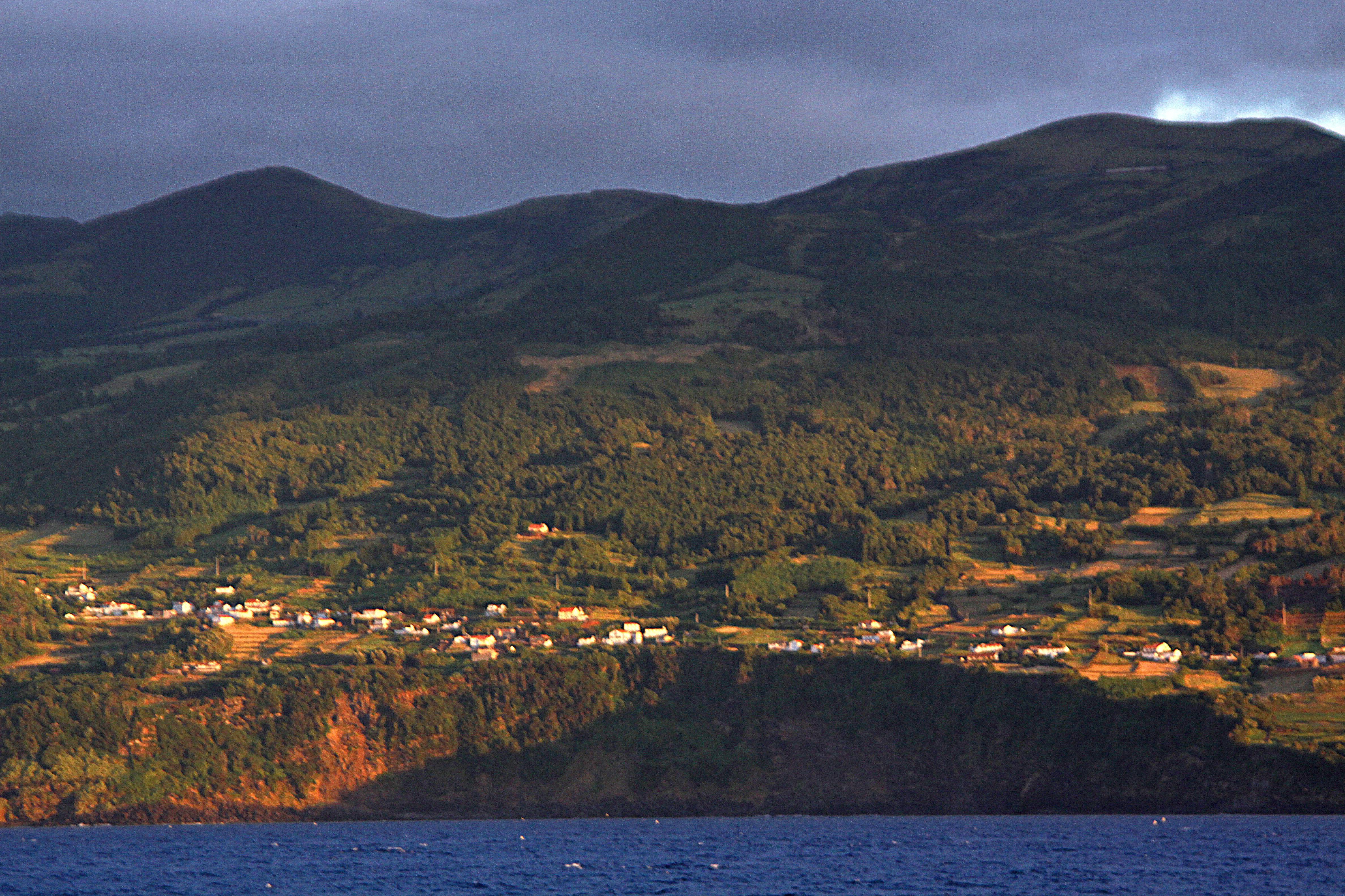 Ilha do Pico, Açores. Arrivée à São Roque.